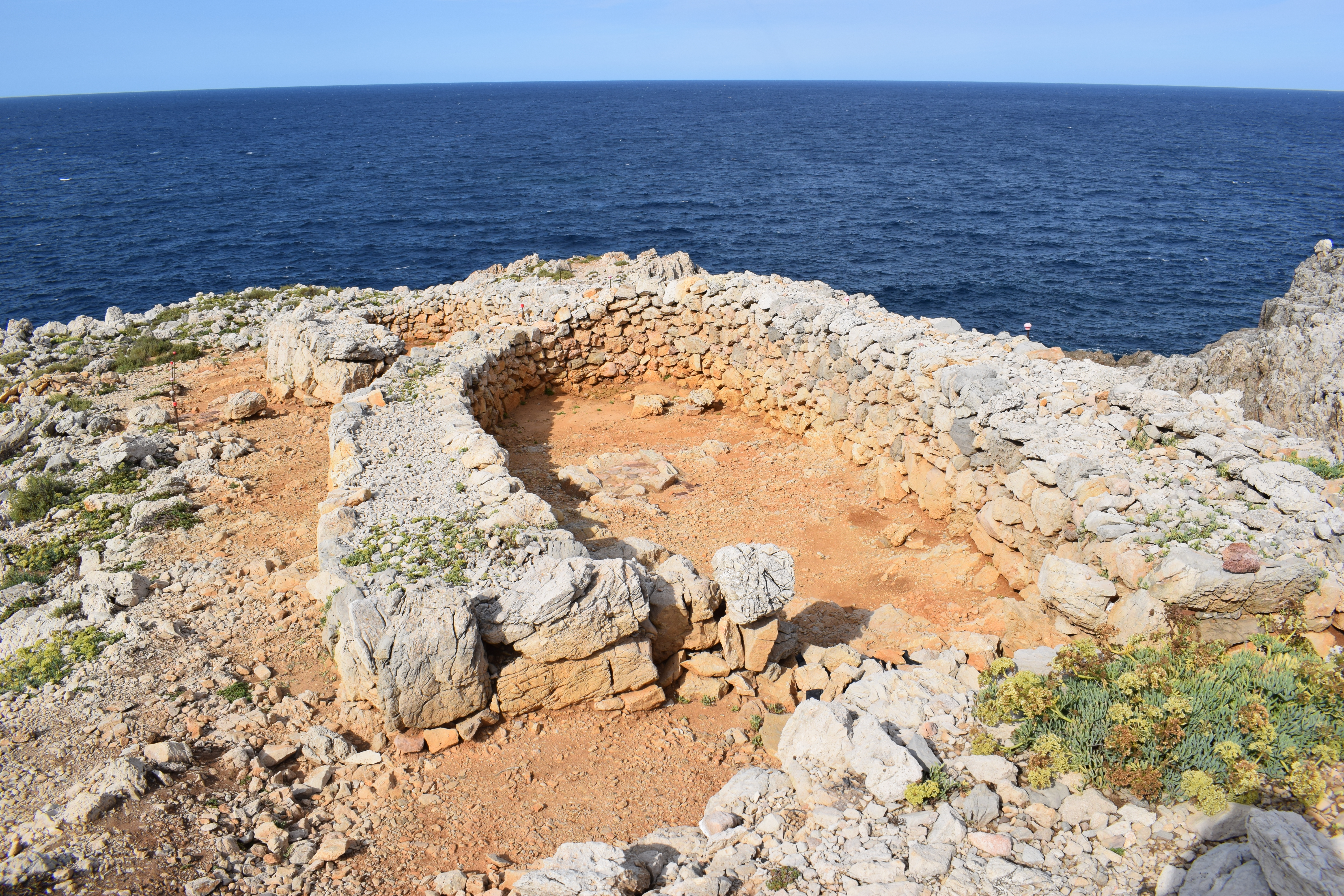 Reste eines naviformen Hauses in der Küstensiedlung von Cala Morell.